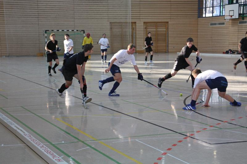 Hallenhockey-Spiel in Deutschland